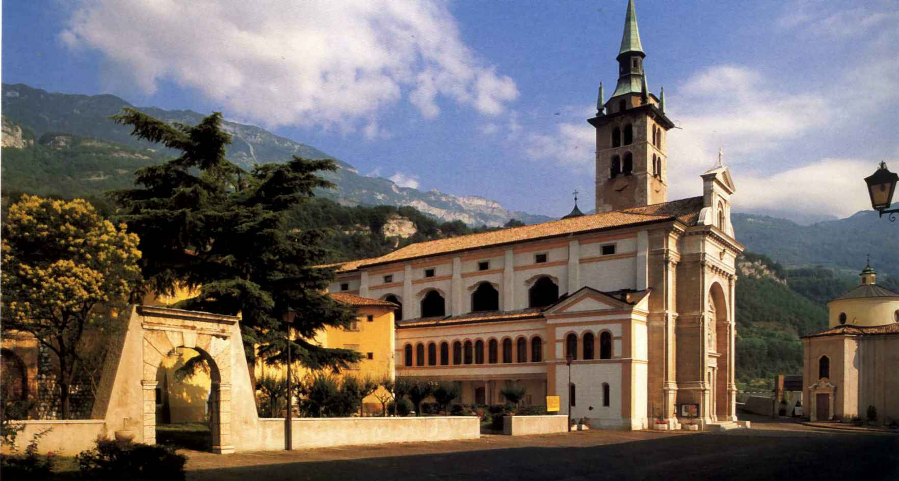 Villa Lagarina, la Pieve di Santa Maria Assunta